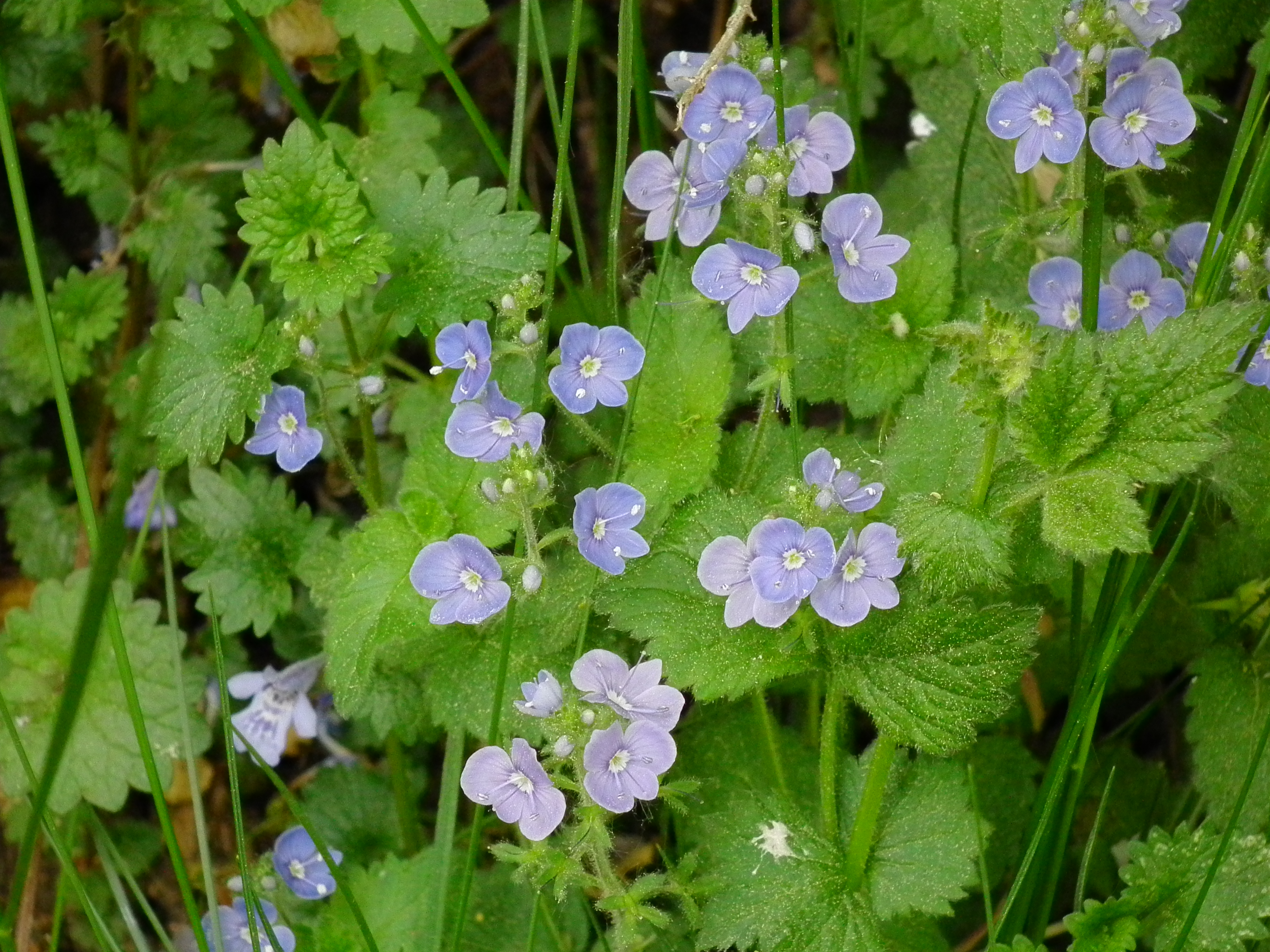 Gamander-Ehrenpreis (Veronica chamaedrys), fotografiert in einem Waldstück in Erlenbach (Hessen, Deutschland)